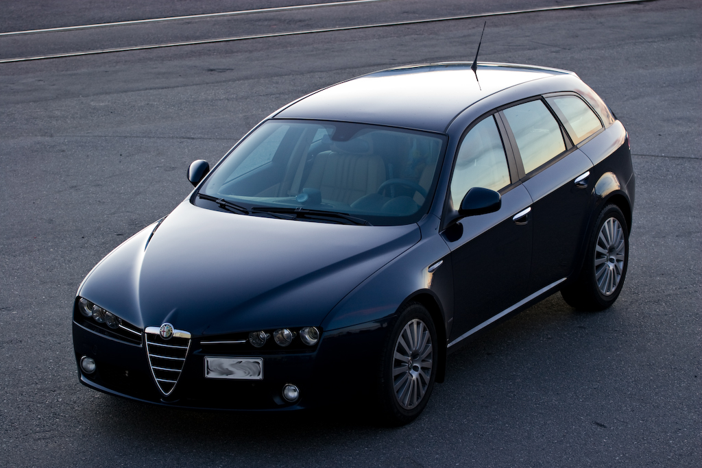 2007 Alfa Romeo 159 SW